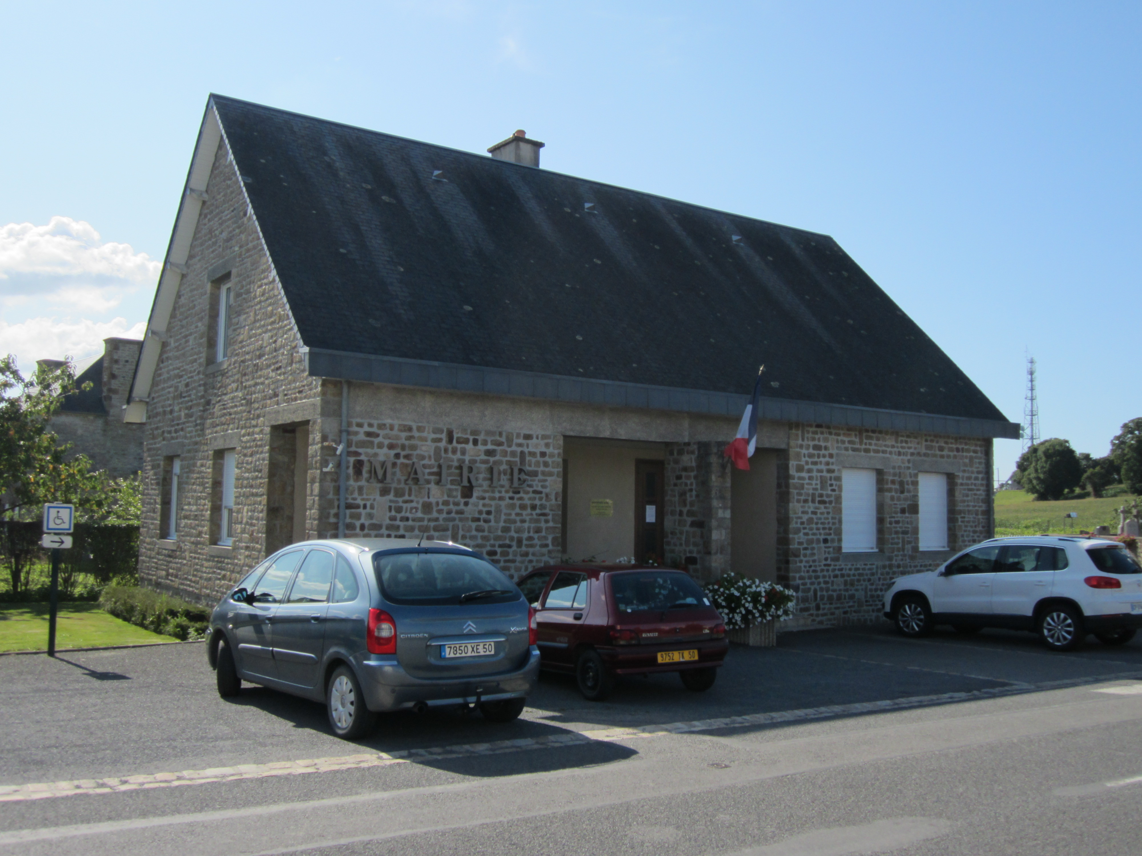 Saint-Senier-sous-Avranches, Manche